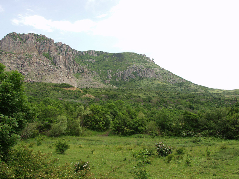 Вид Демерджи